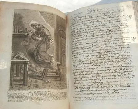 Manuscrito con ilustración xilográfica del siglo XVIII